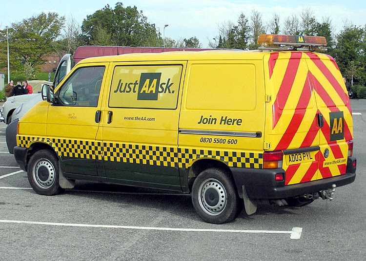 AA van, Bristol, England